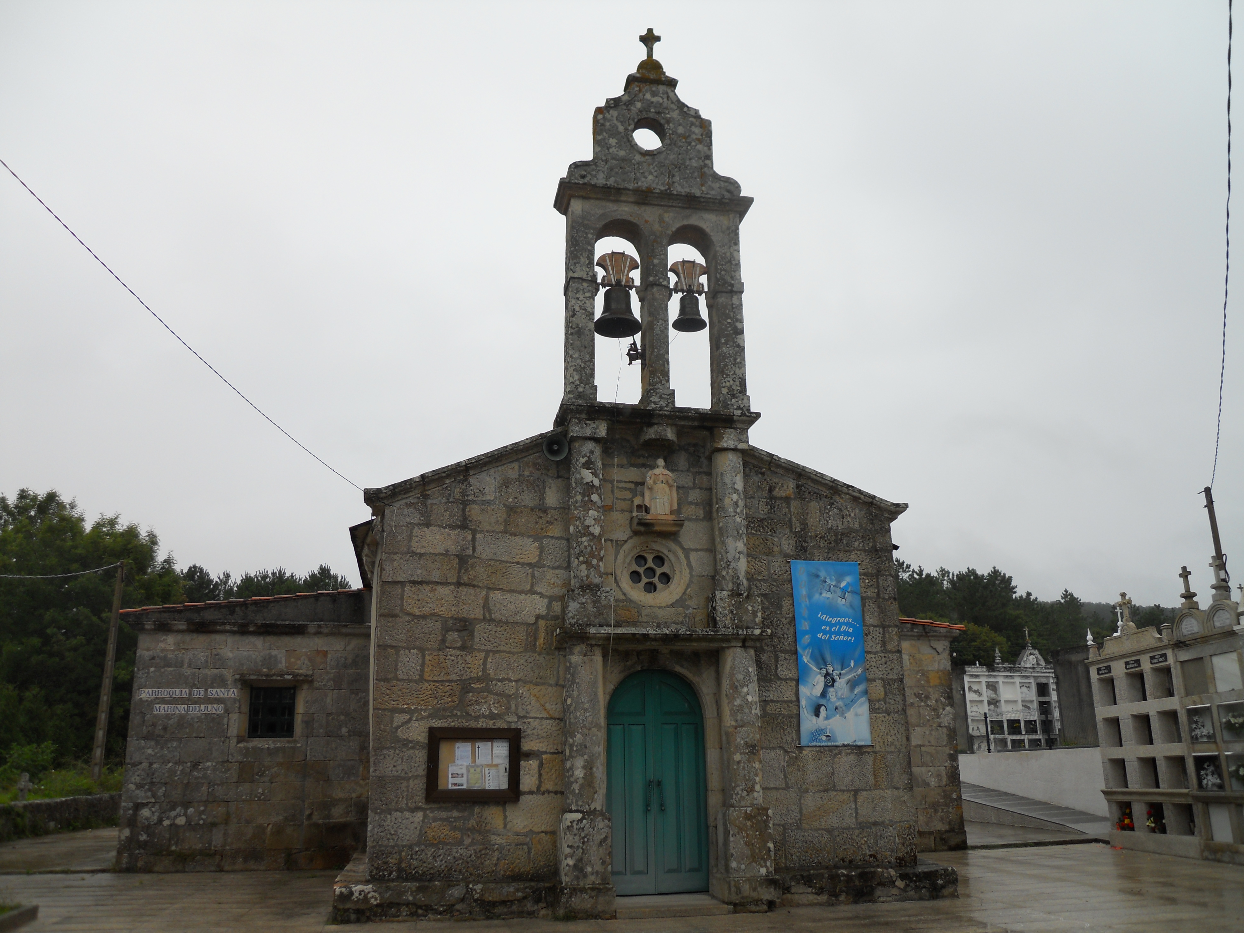 Construida en el siglo XII, sufre diversas modificaciones en épocas posteriores.